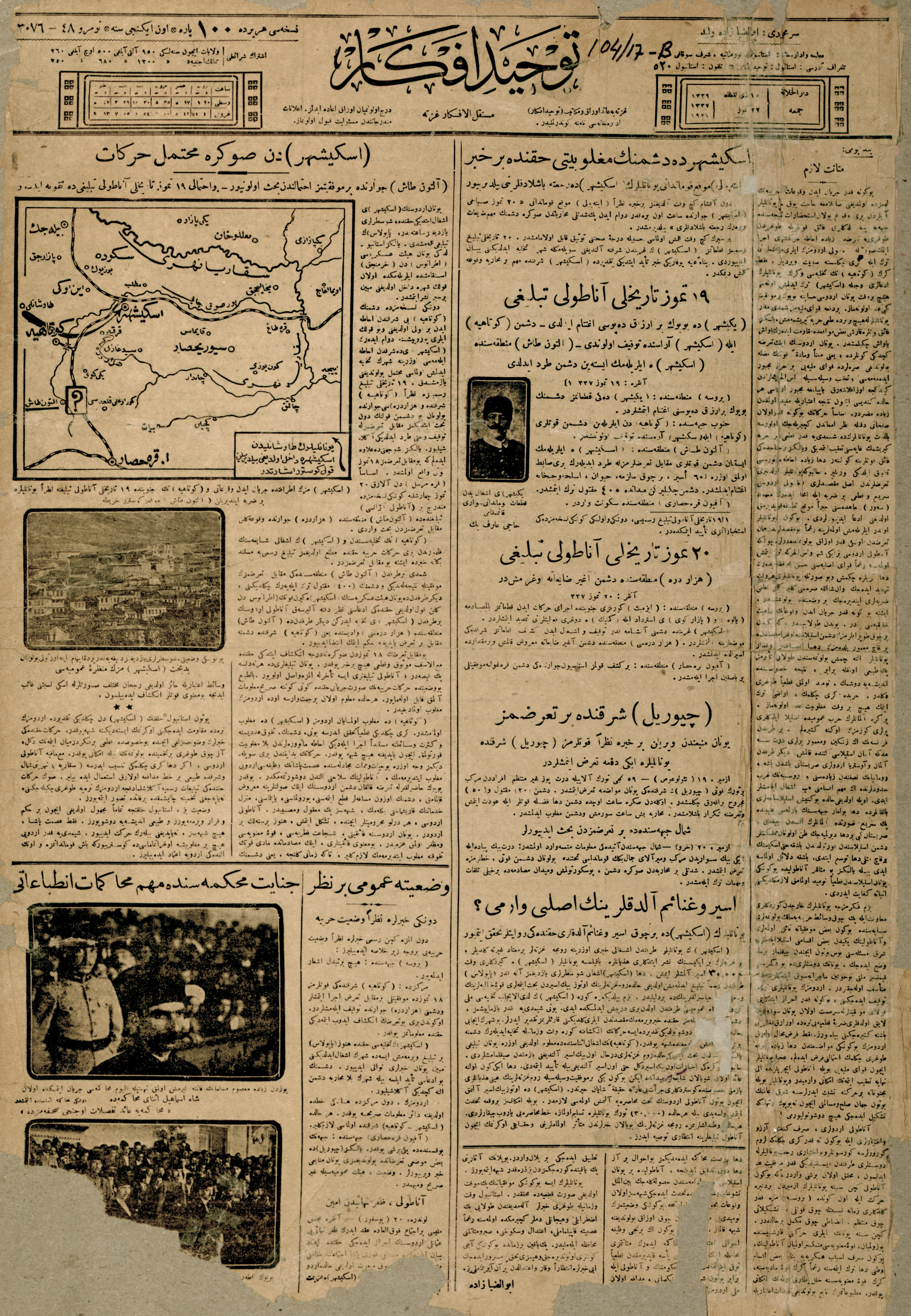 Tevhîd-i Efkâr, 15 Haziran 1921 ile 6 Mart 1925 tarihleri arasında yayımlanan günlük siyasi gazetedir.